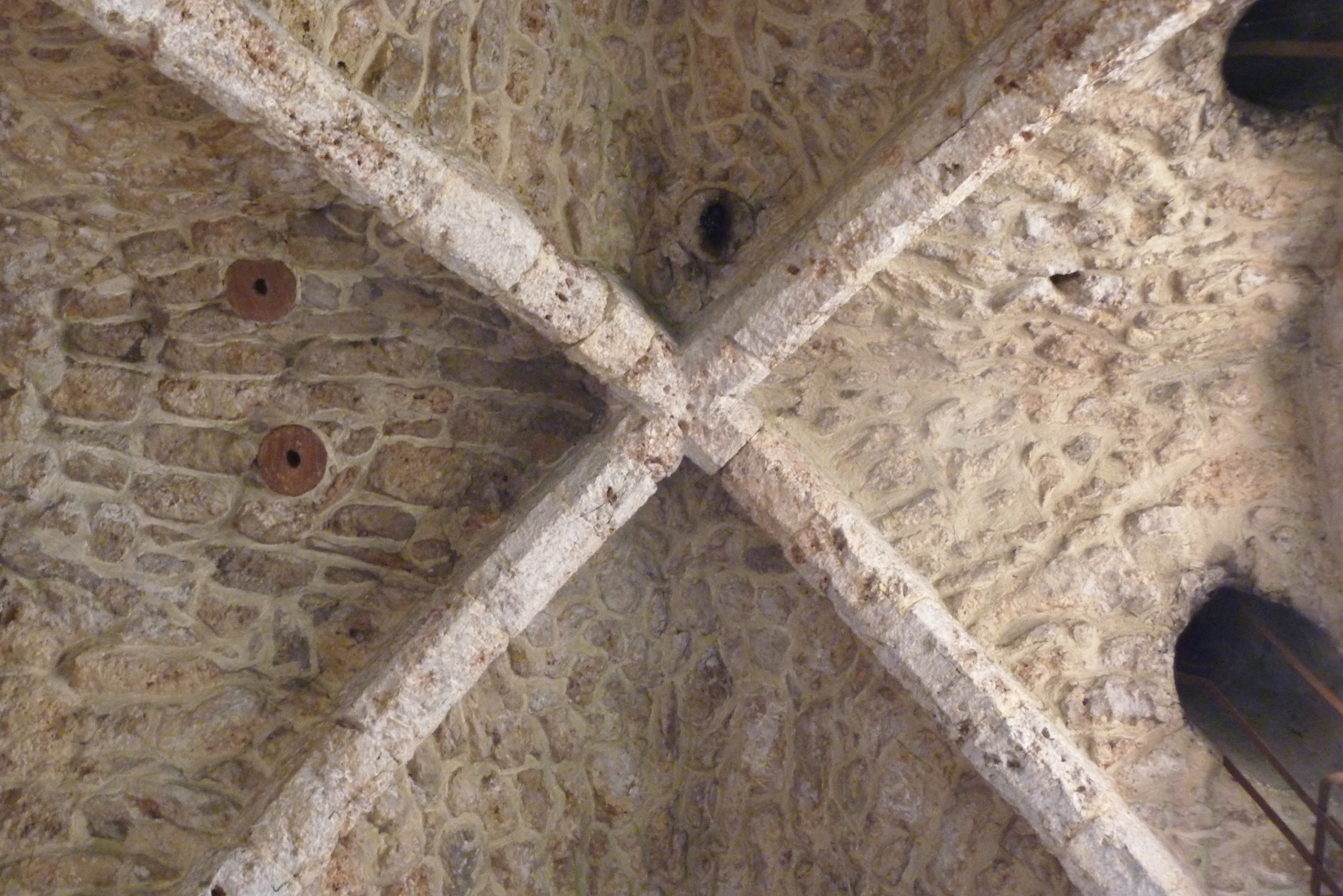 Katholische Pfarrkirche Saint-Matthieu in Bures-sur-Yvette im Département Essonne (Île-de-France), vierteiliges Kreuzrippengewölbe